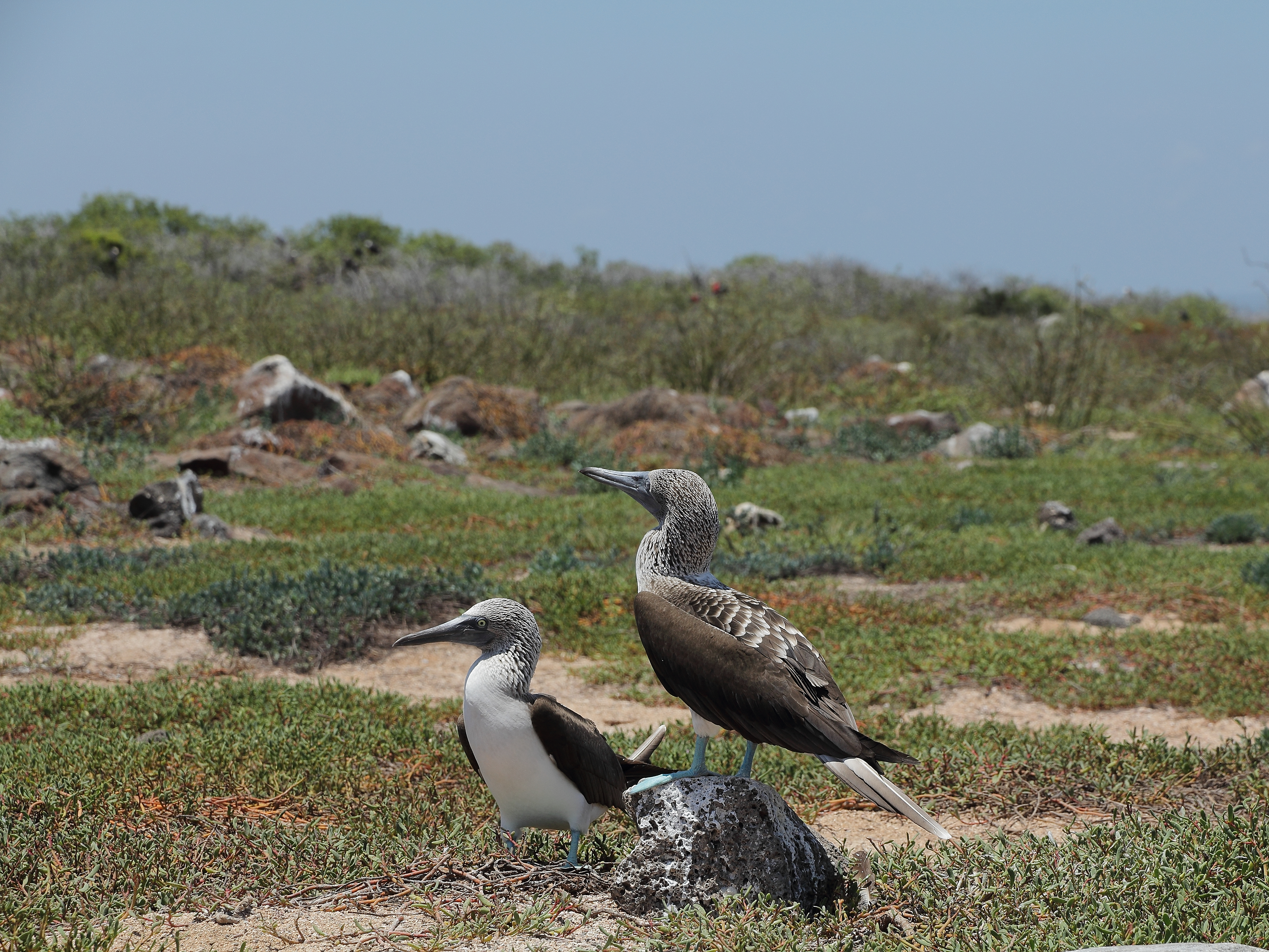 Sula nebouxii på Seymour Norte, Galápagosöarna.